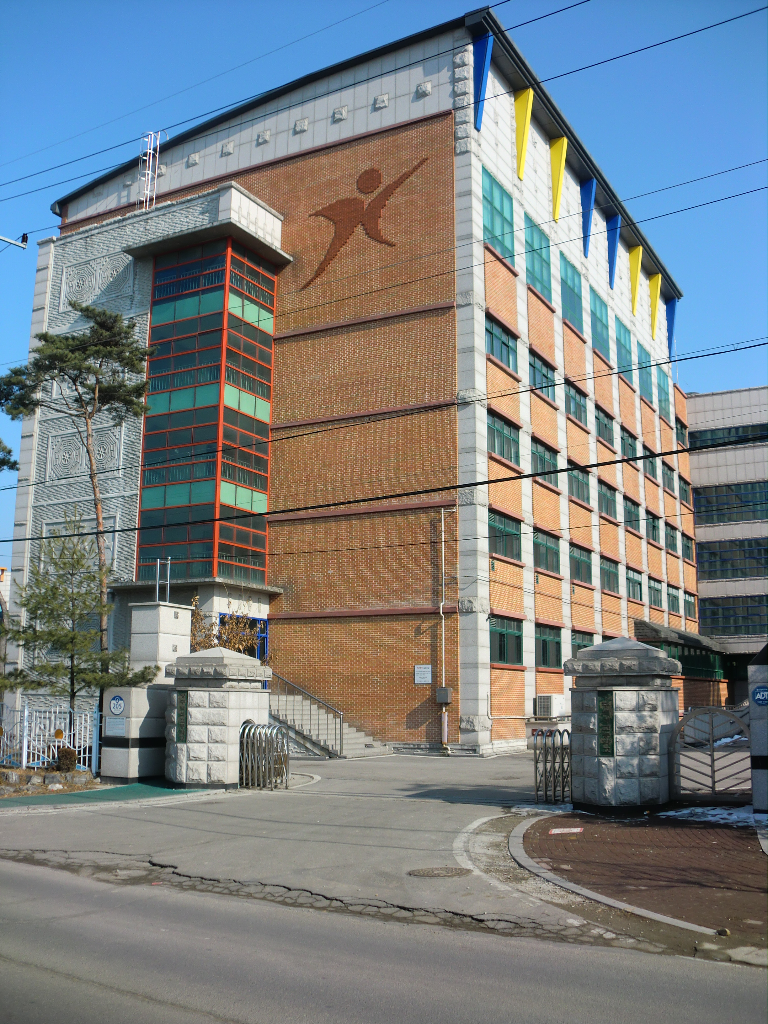 경기도 양주시에 있는 양주백석고등학교